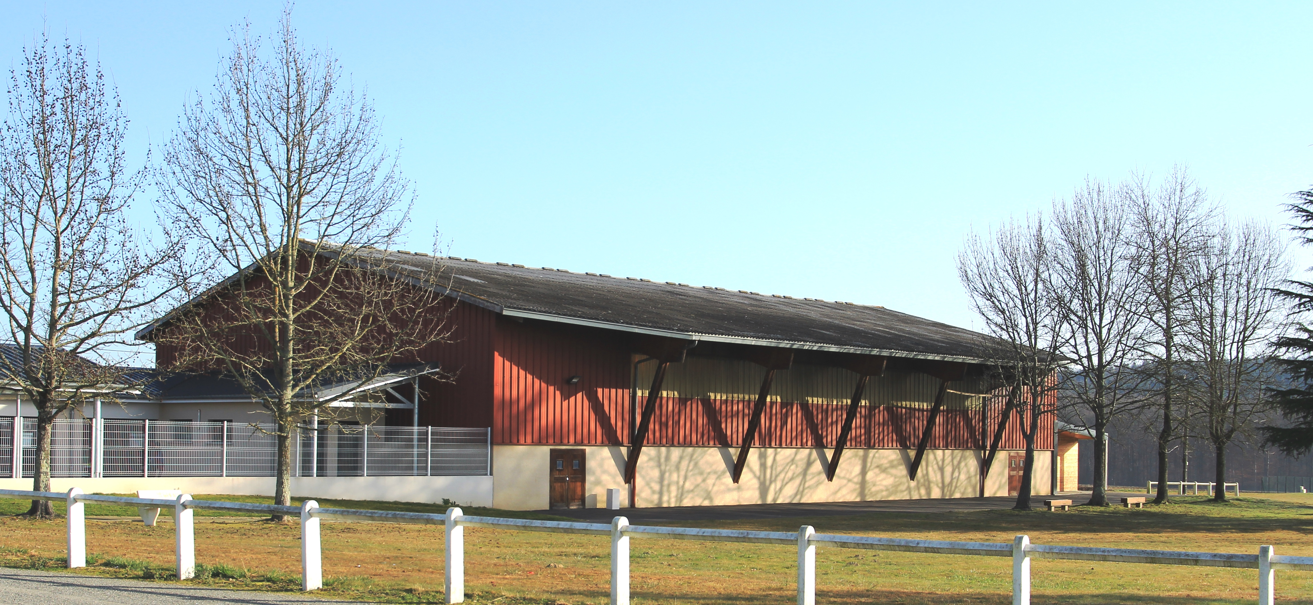 Salle des fêtes de Pouyastruc (Hautes-Pyrénées)